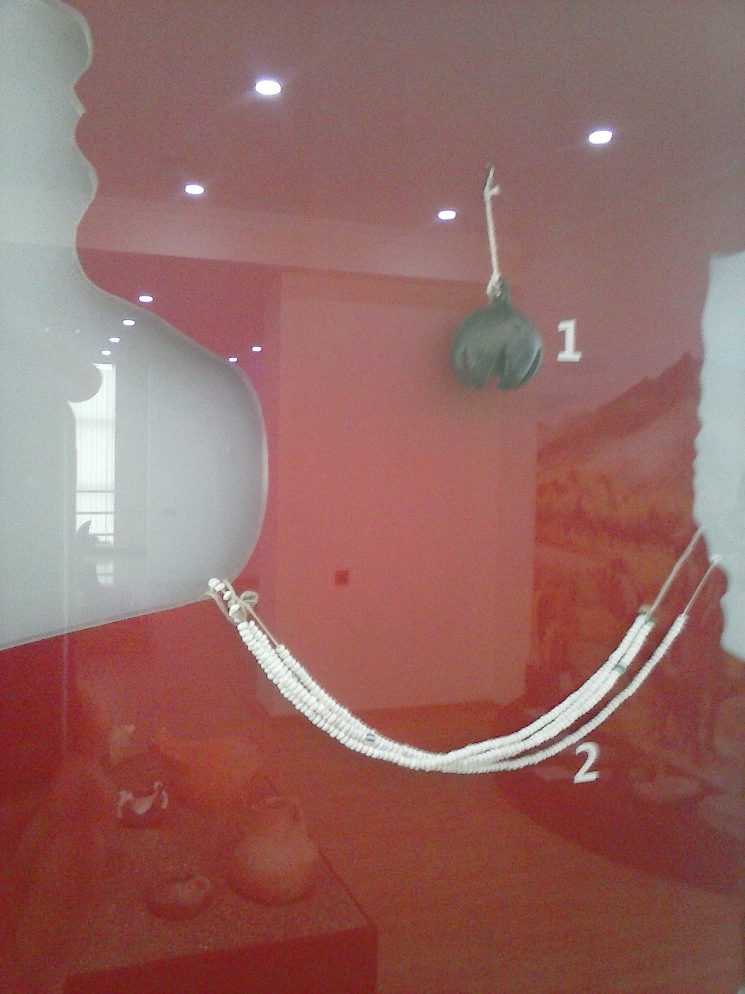 Məhi adlanan ərazidən tapılmış bəzək əşyalarından nümunələr: 1.Sırğa e.ə. IX-VIII əsrlər Tunc tökmə 2. Boyunbağı e.ə. III minillik Pata muncuqları